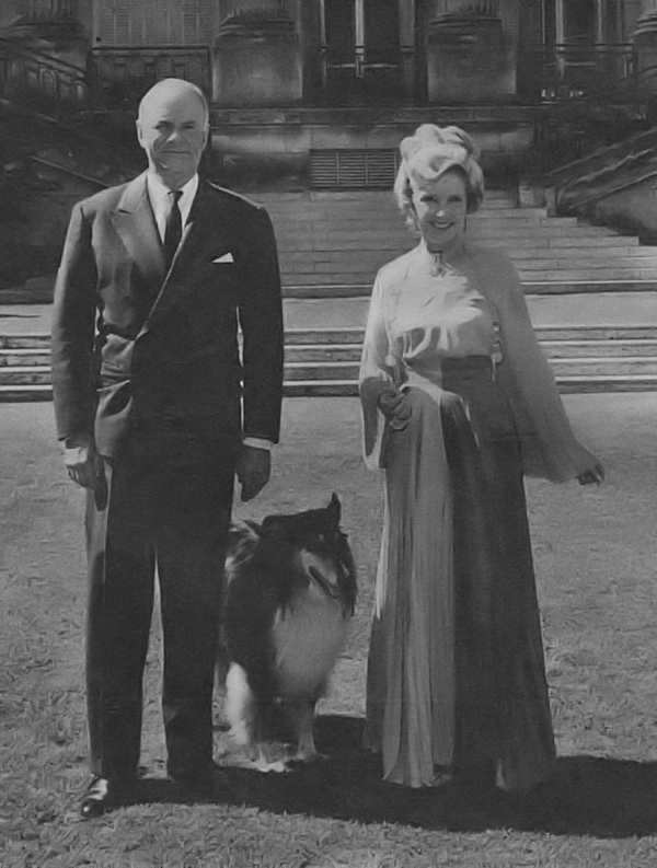 con su esposo John Davis Lodge en la embajada de USA en Buenos Aires, 1971